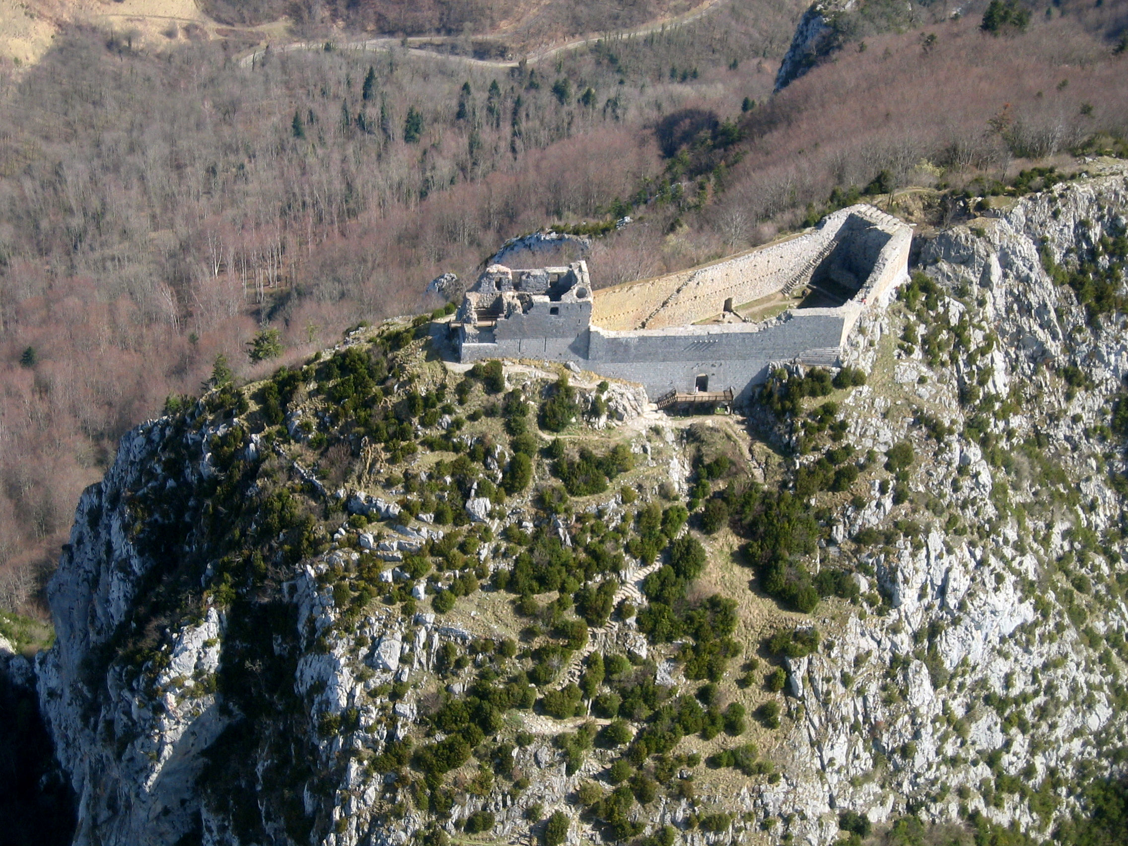 Vue aérienne du Château de Montségur depuis un avion de tourisme .